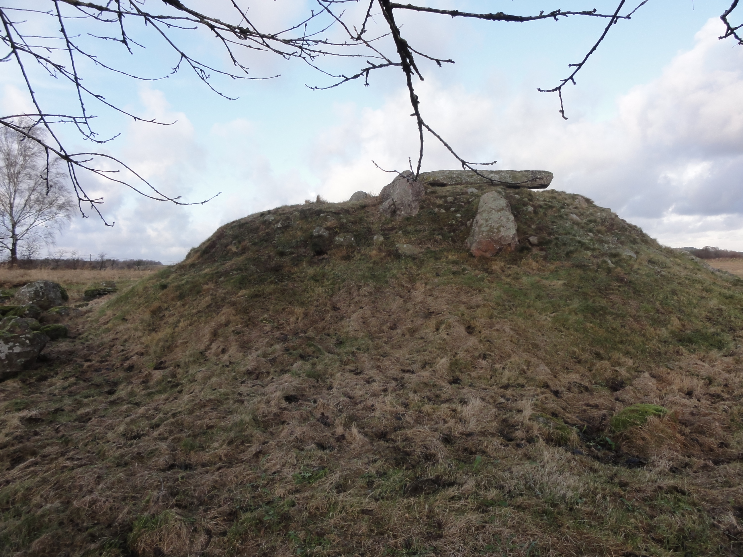 Östra Klastorpsdösen